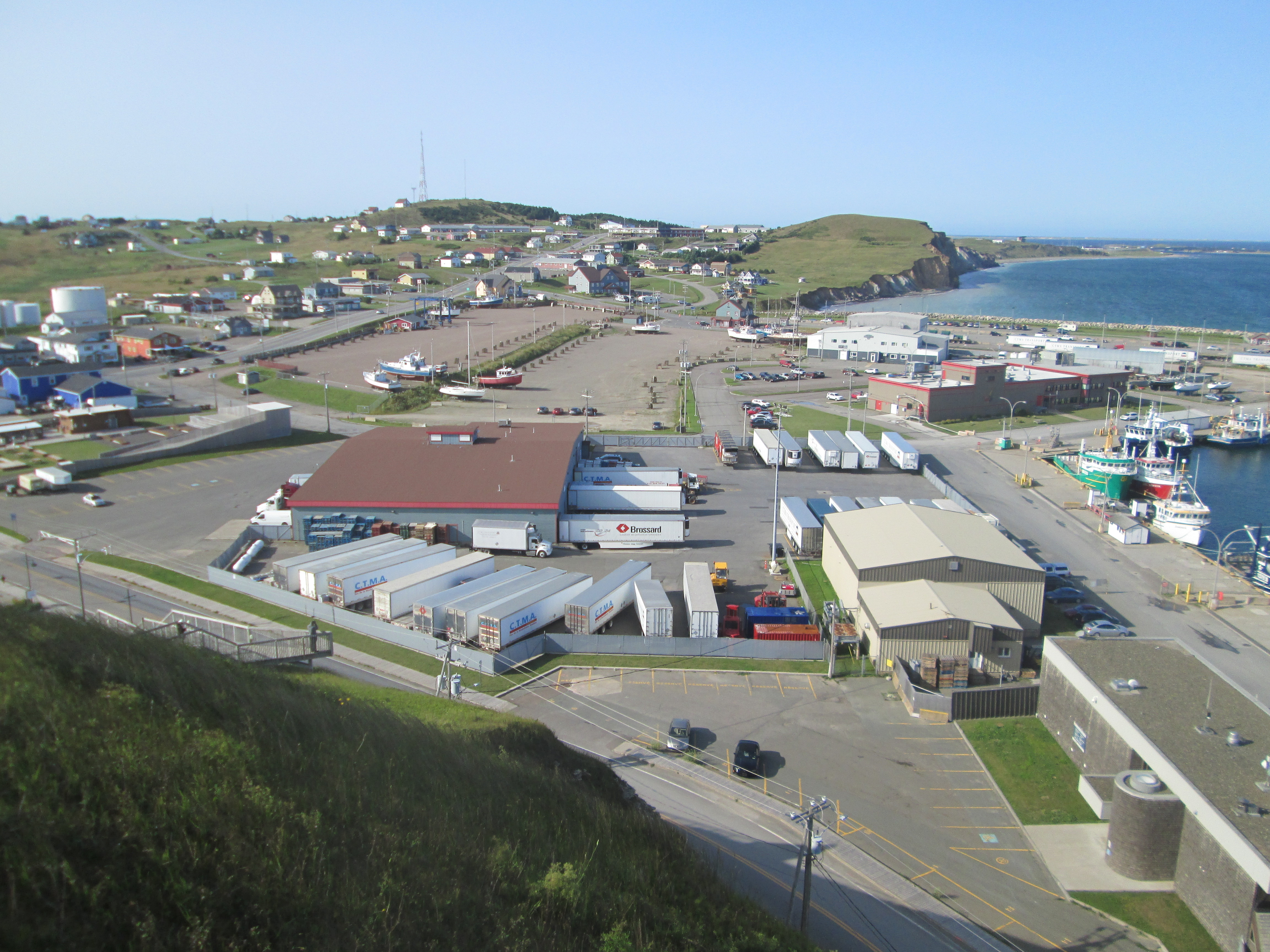 August 19, 2018